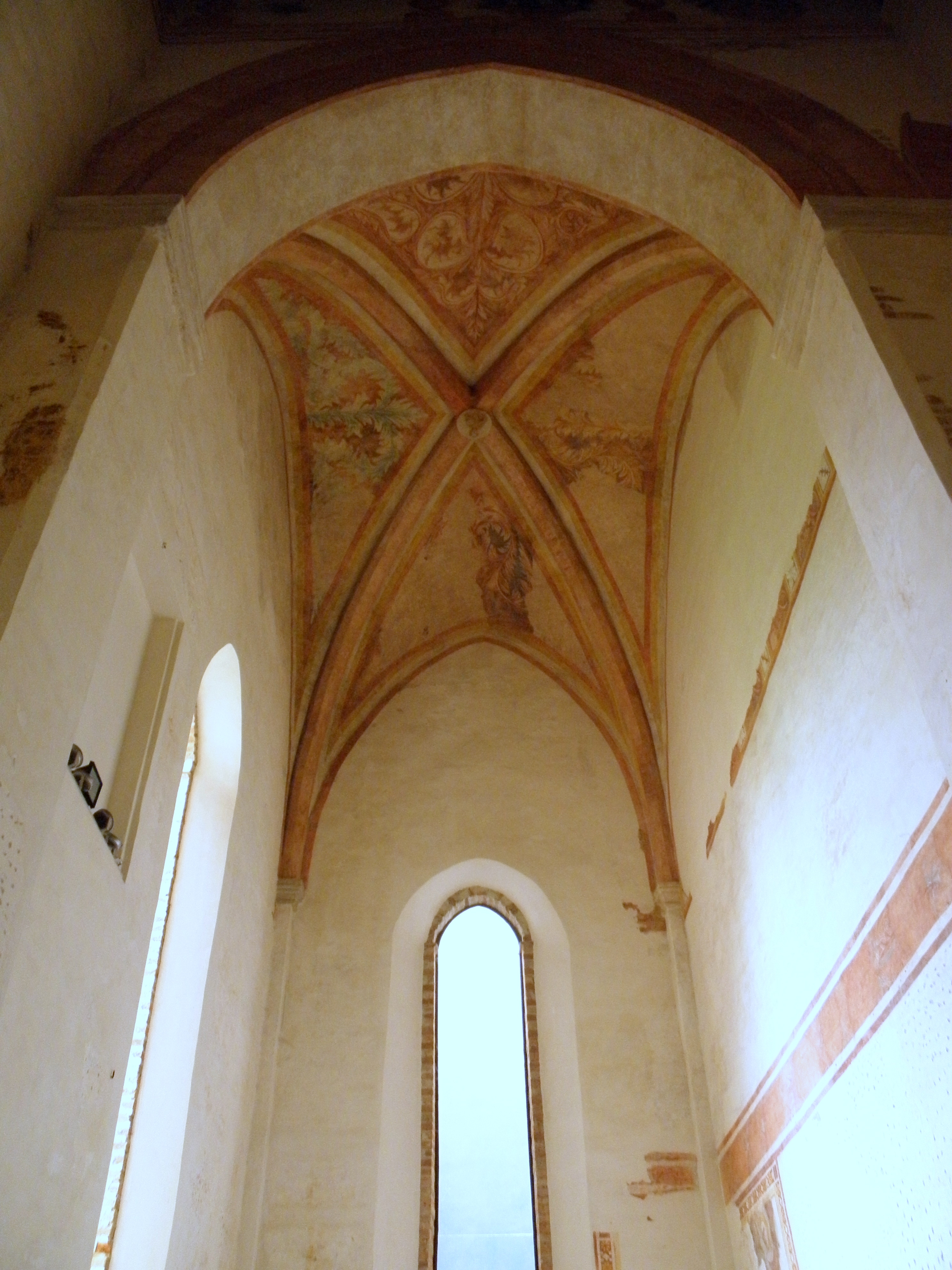 Rovigo: la chiesa parrocchiale dei santi Francesco e Giustina. Particolare dell'affresco della volta della cappella gotica.